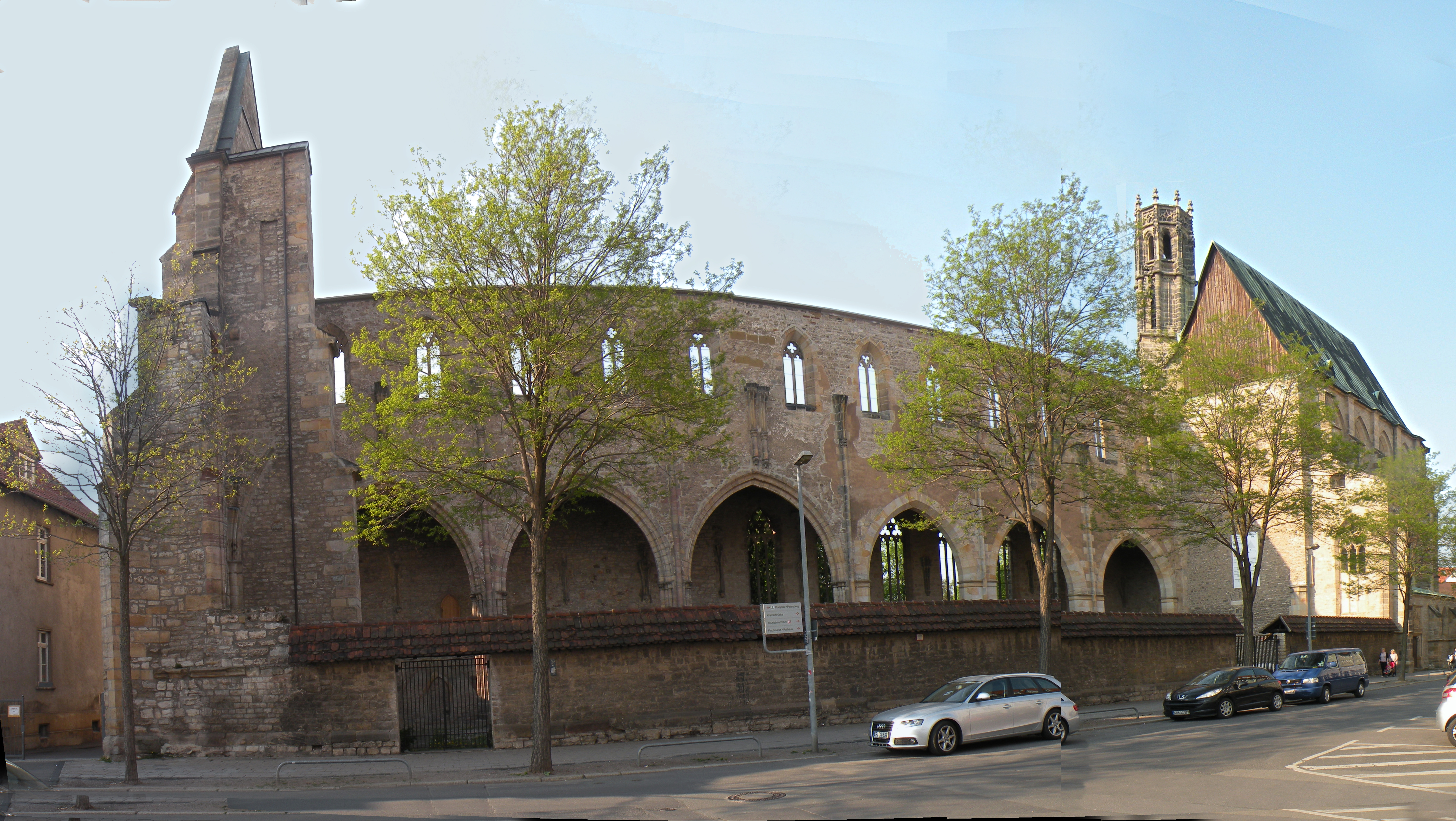 Развалины бывшей церкви францисканцев. Разрушена во время бомбардировки с воздуха.